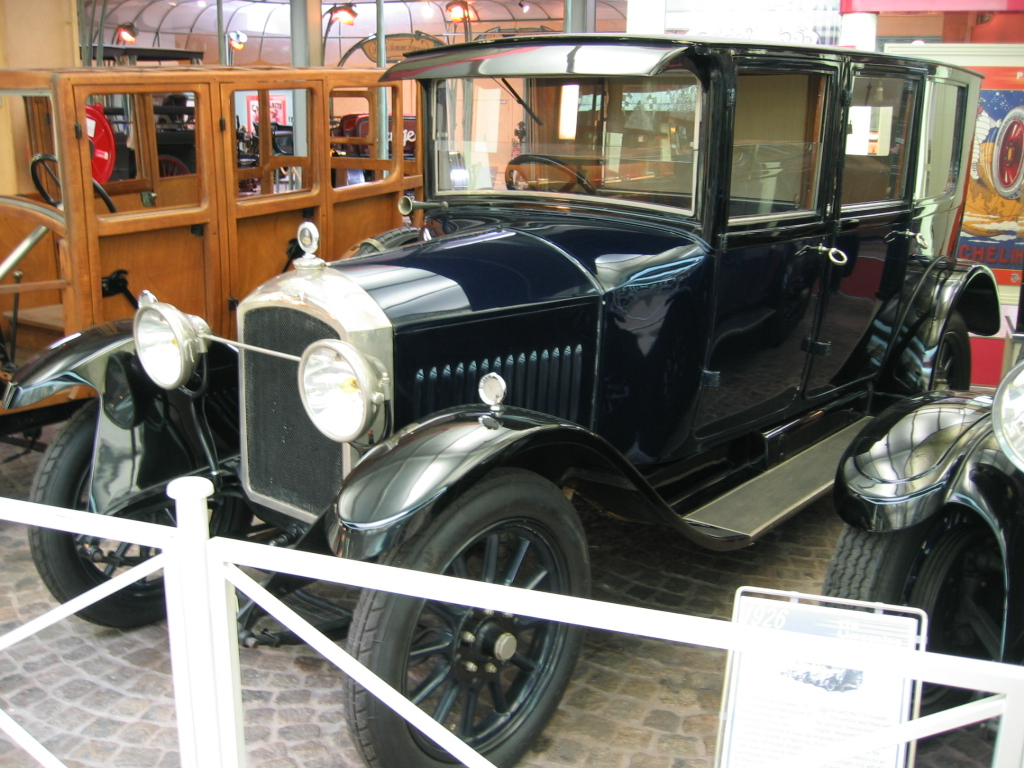 Peugeot Type 153 - Musée Peugeot Sochaux